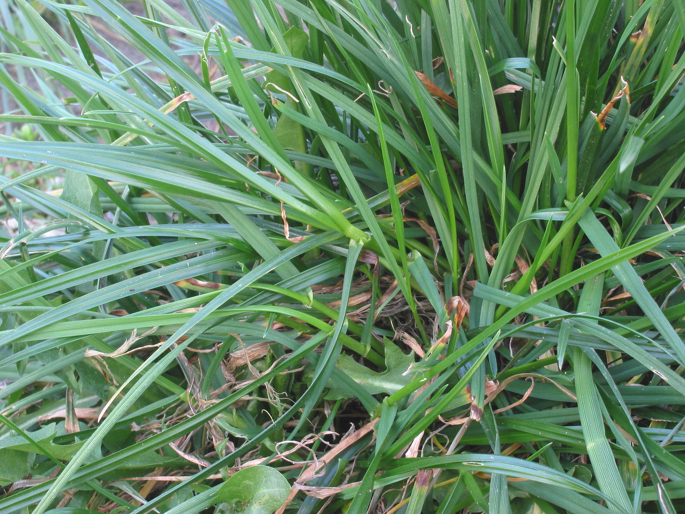 (nl: Engels raaigras spruiten) Lolium perenne tillers